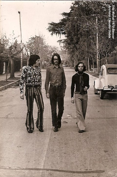 El Trío Manal, caminando por una calle del barrio de Beccar, donde ensayaban (1970), Archivo Claudio Gabis.